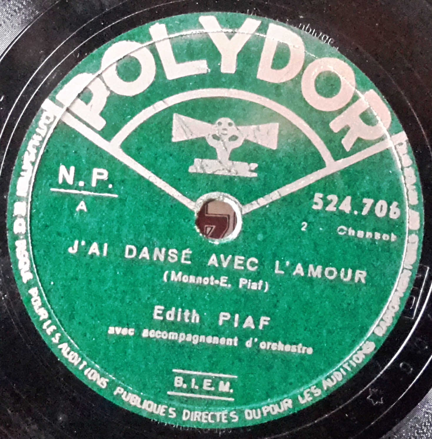 Label der frz. Polydor, Aufnahme mit Édith Piaf